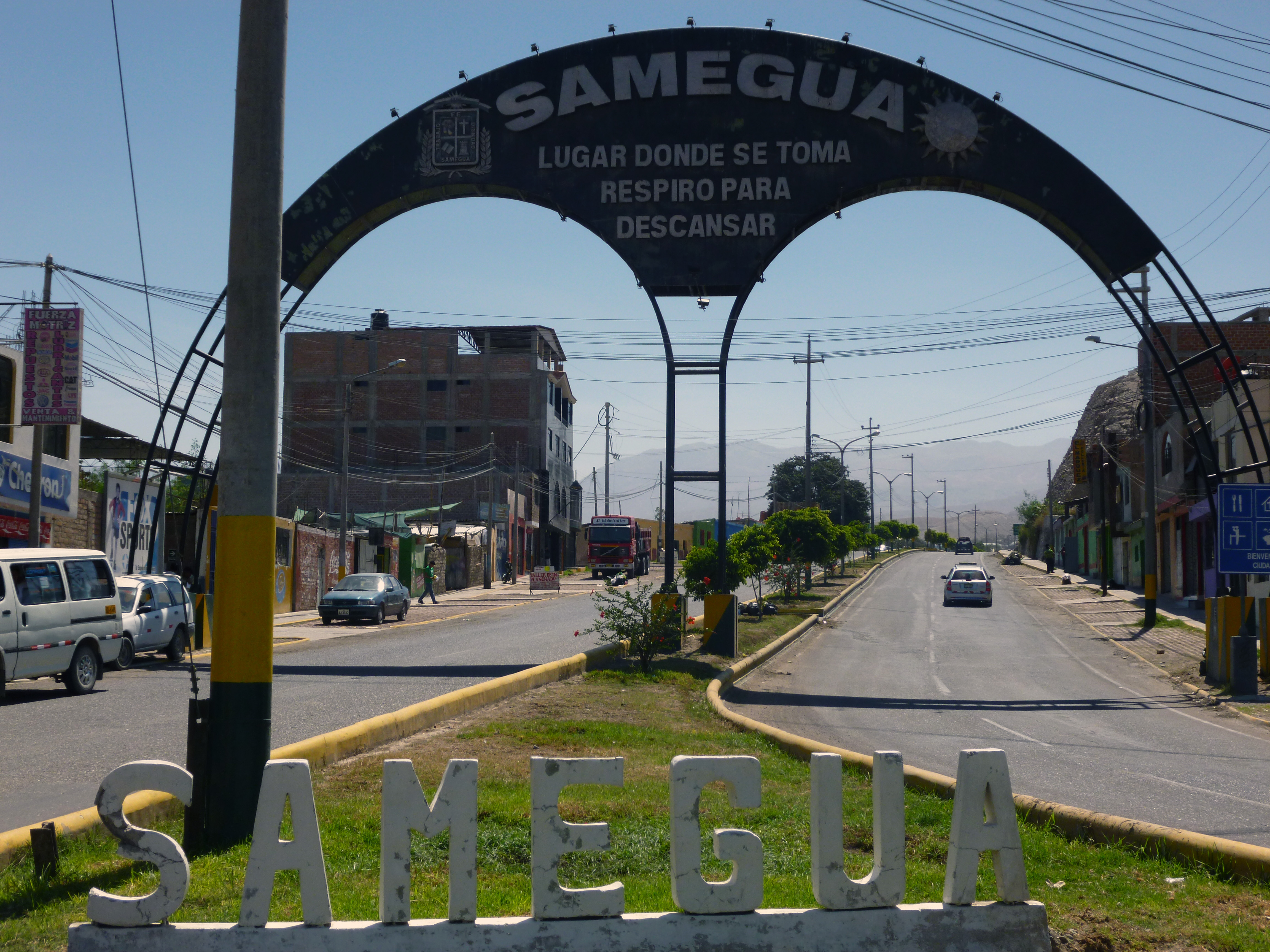 Arco y Letras que san la bienvenida al distrito de Samegua